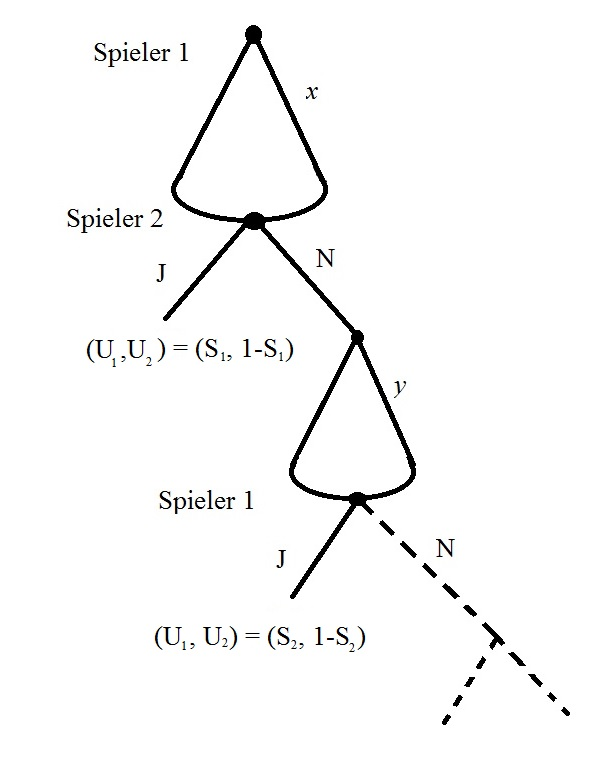 Rubinstein Verhandlungsmodell